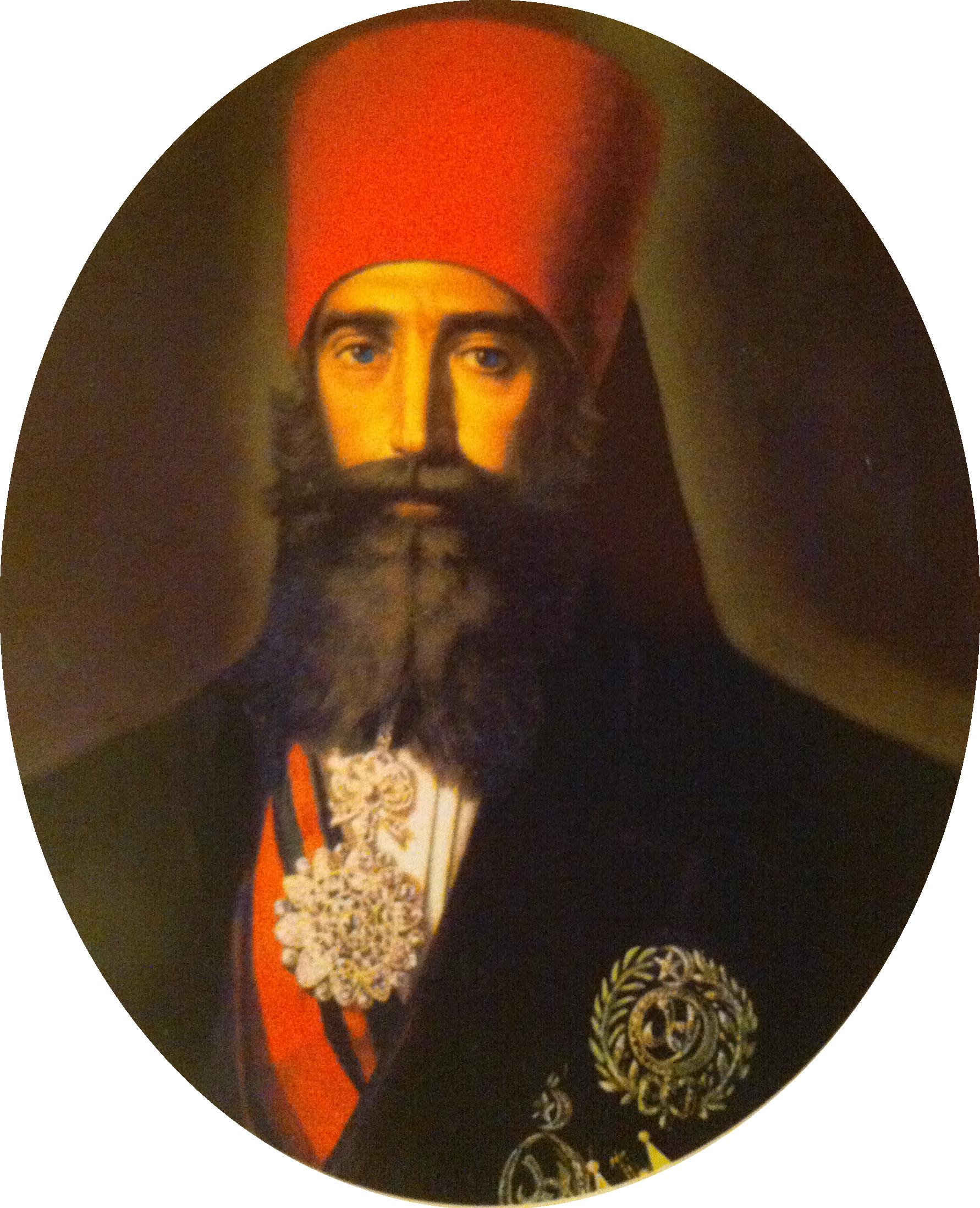 Ahmad Bey Tableau illustrant Ahmed Bey décoré du Nichan ad-Dam, du Nichan Iftikhar, de la grand-croix de la Légion d'honneur et de l'ordre des Saints-Maurice-et-Lazare Huile sur toile, 118 x 102 cm Tunis, Institut national du patrimoine, collection Qsar es-Saïd, inv. M.I. 1100